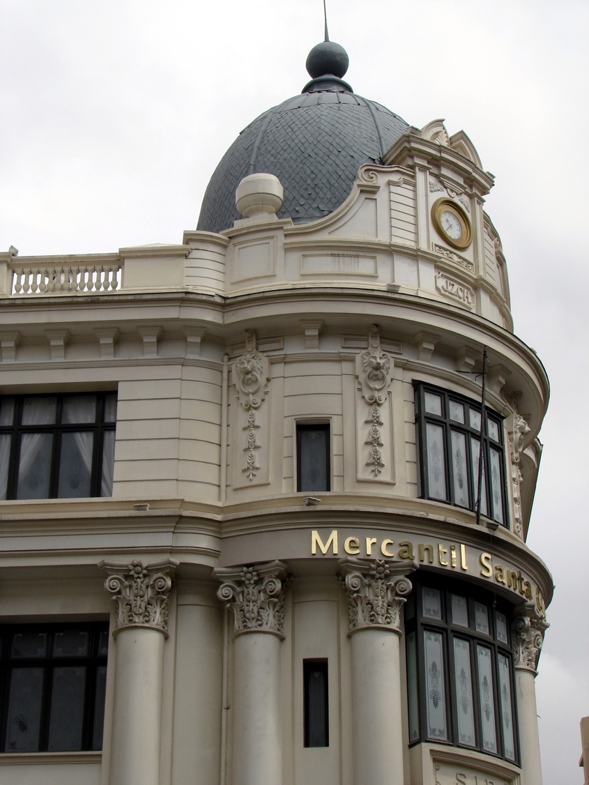 Foto del Banco Mercantil, obra de Emilio Villanueva